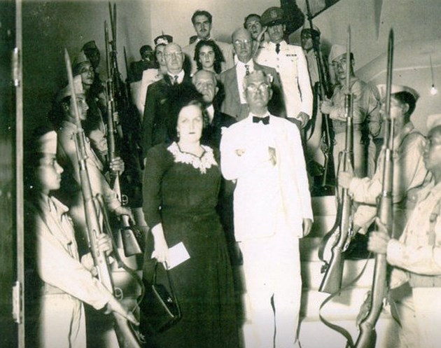 El presidente de la República del Ecuador, Carlos Julio Arosemena Tola y sus esposa, Laura Monroy Garaycoa, alrededor de 1940.